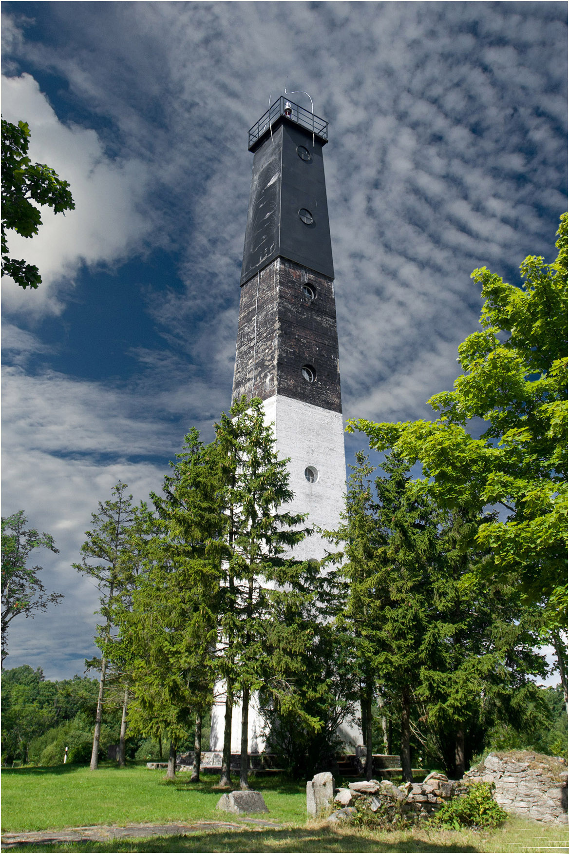 Anseküla tuletorn